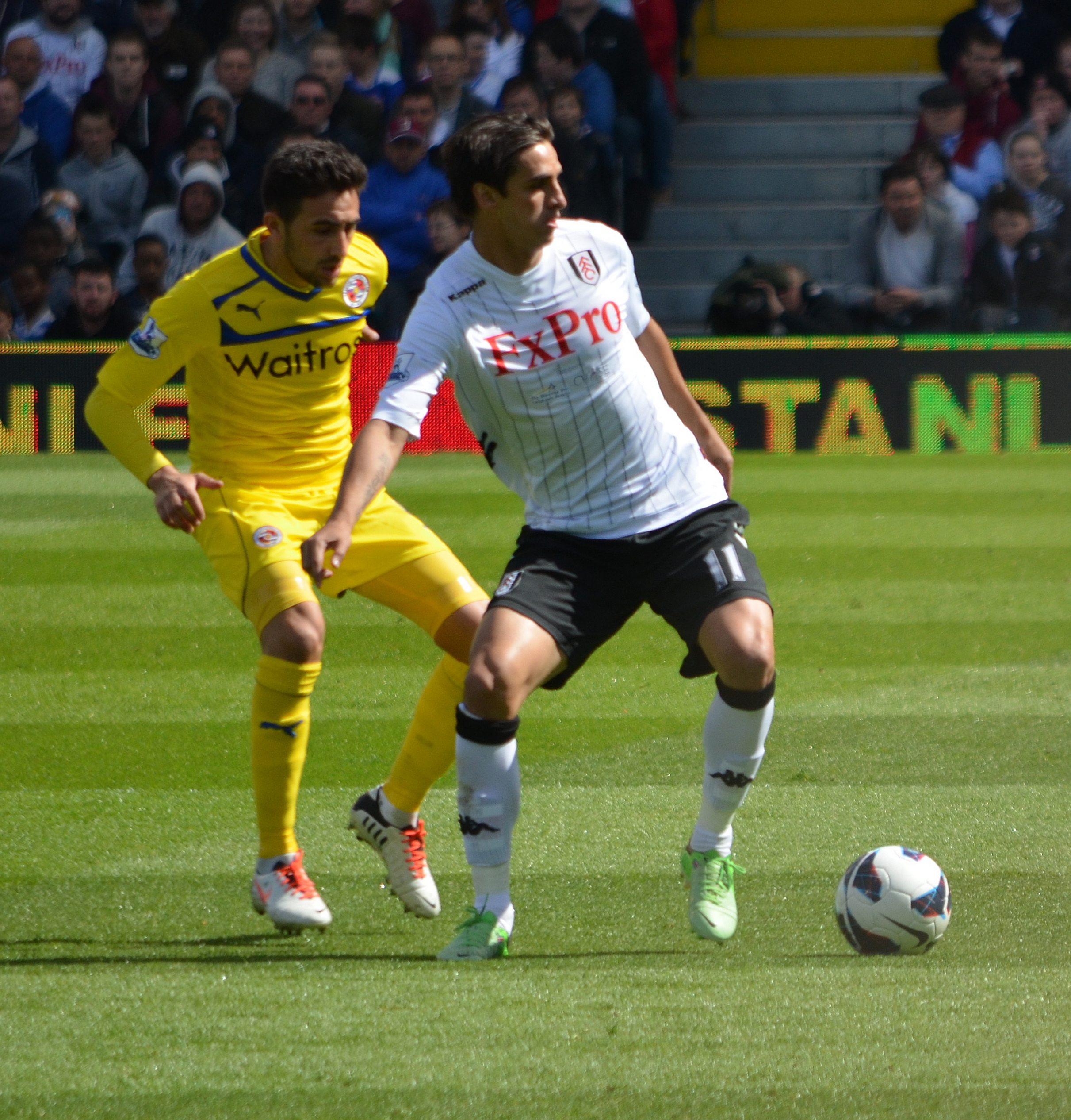 Fulham v Reading, May 2013